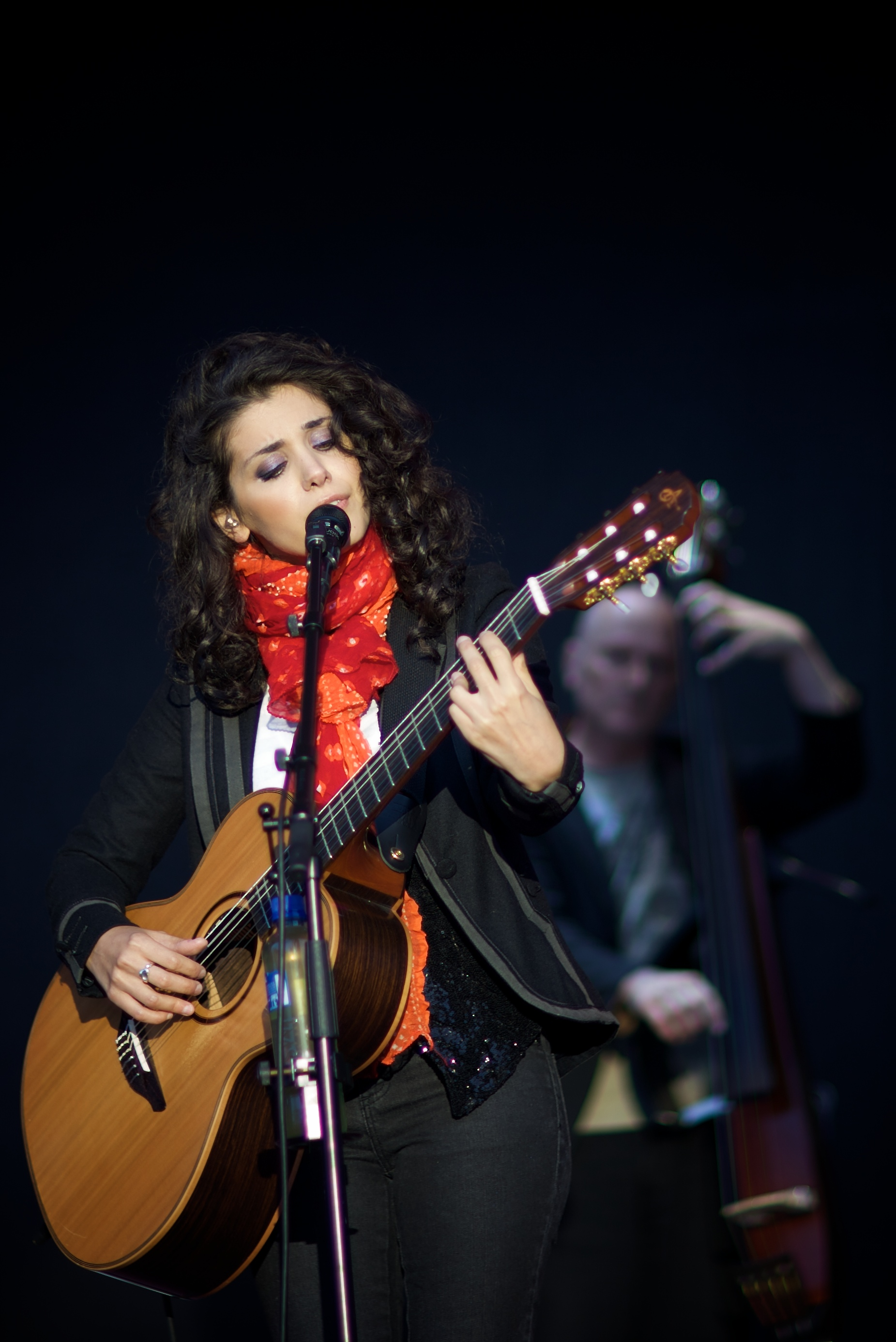 Katie Melua at Wrightegaarden, Norway.